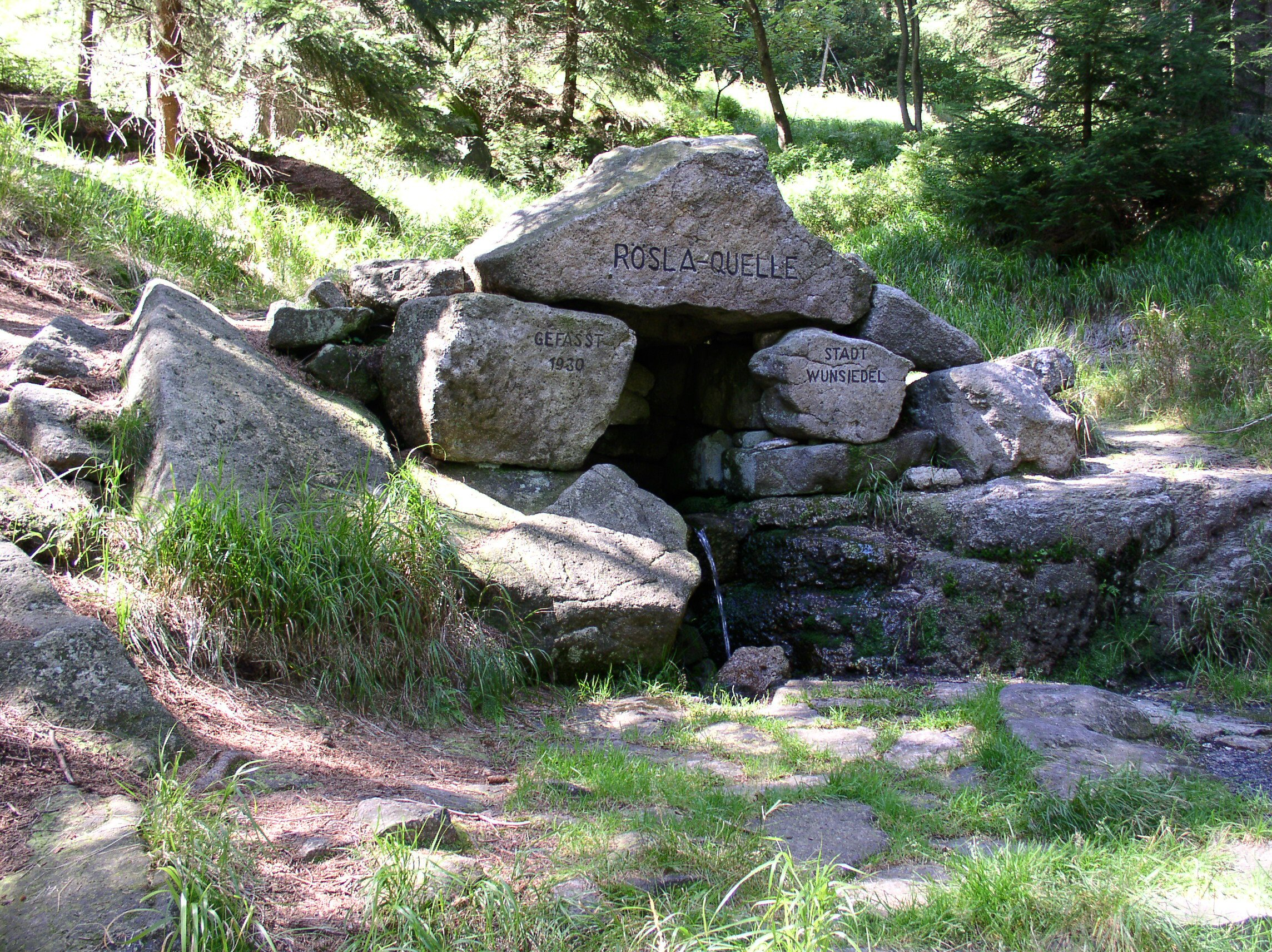 Quelle der Röslau (Rösla) im Fichtelgebirge